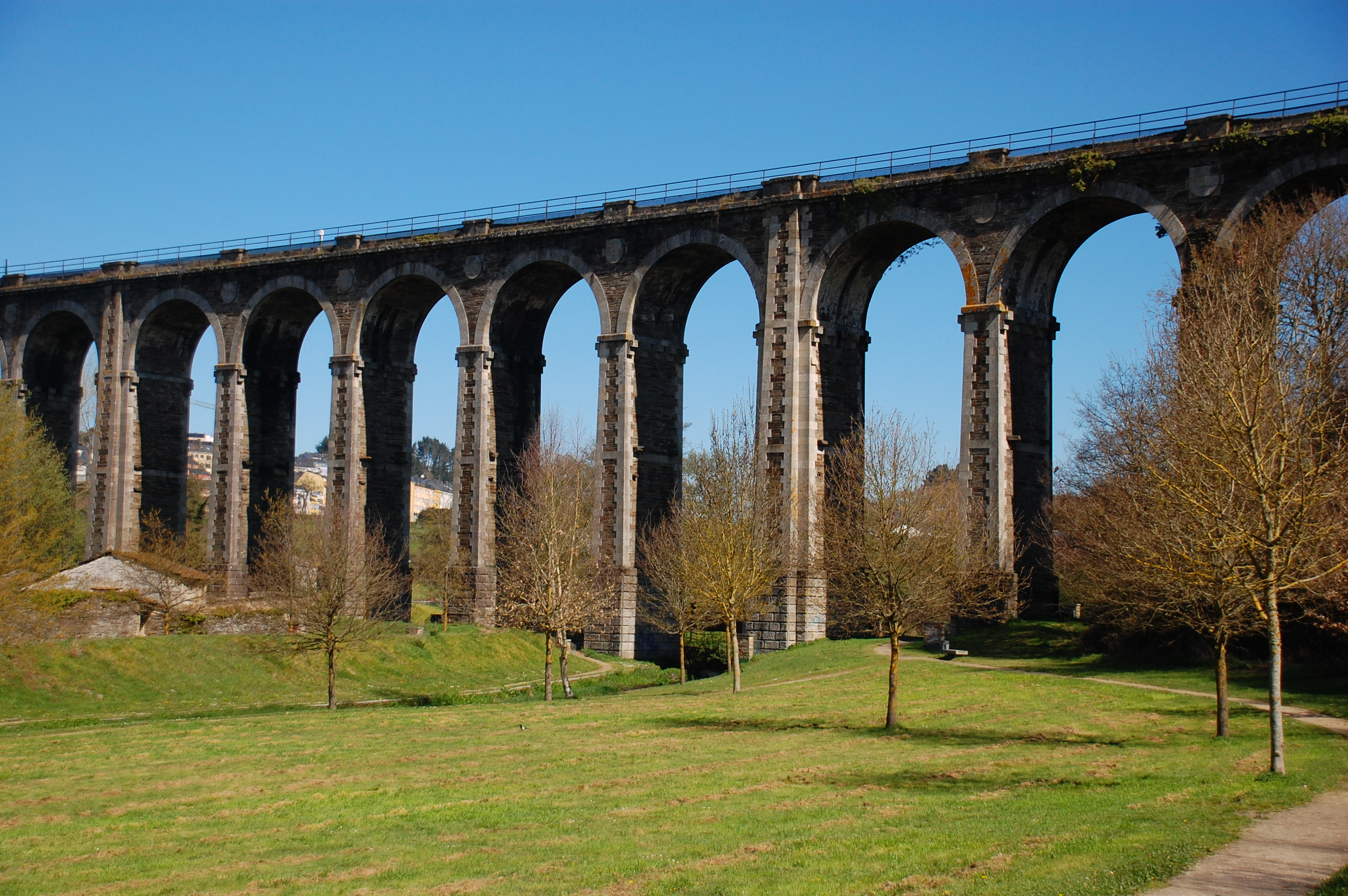 Ponte ferroviaria da Chanca sobre o río Rato (afluente do Miño) en Lugo.